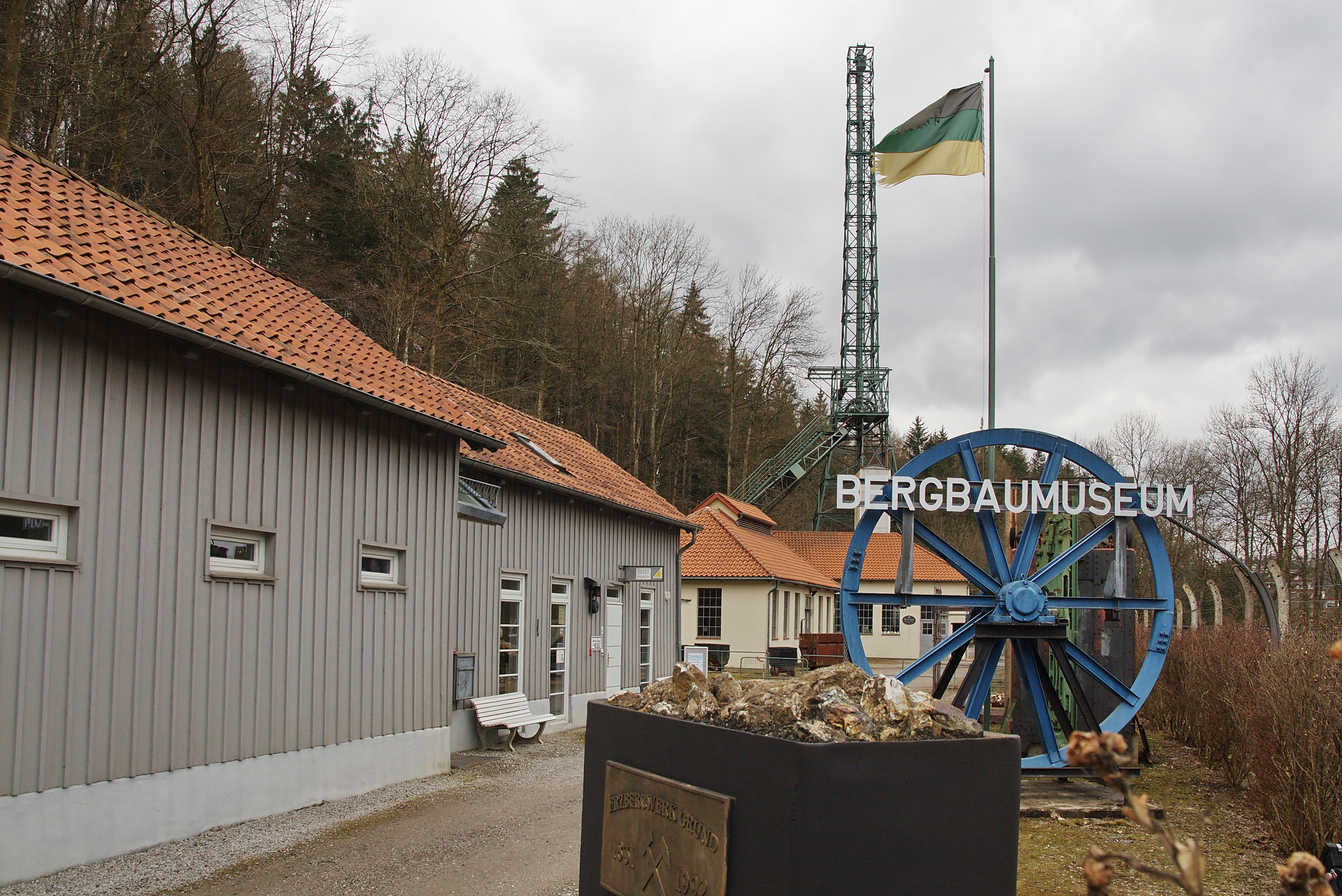 Bergbaumuseum in Bad Grund im Harz (Niedersachsen)